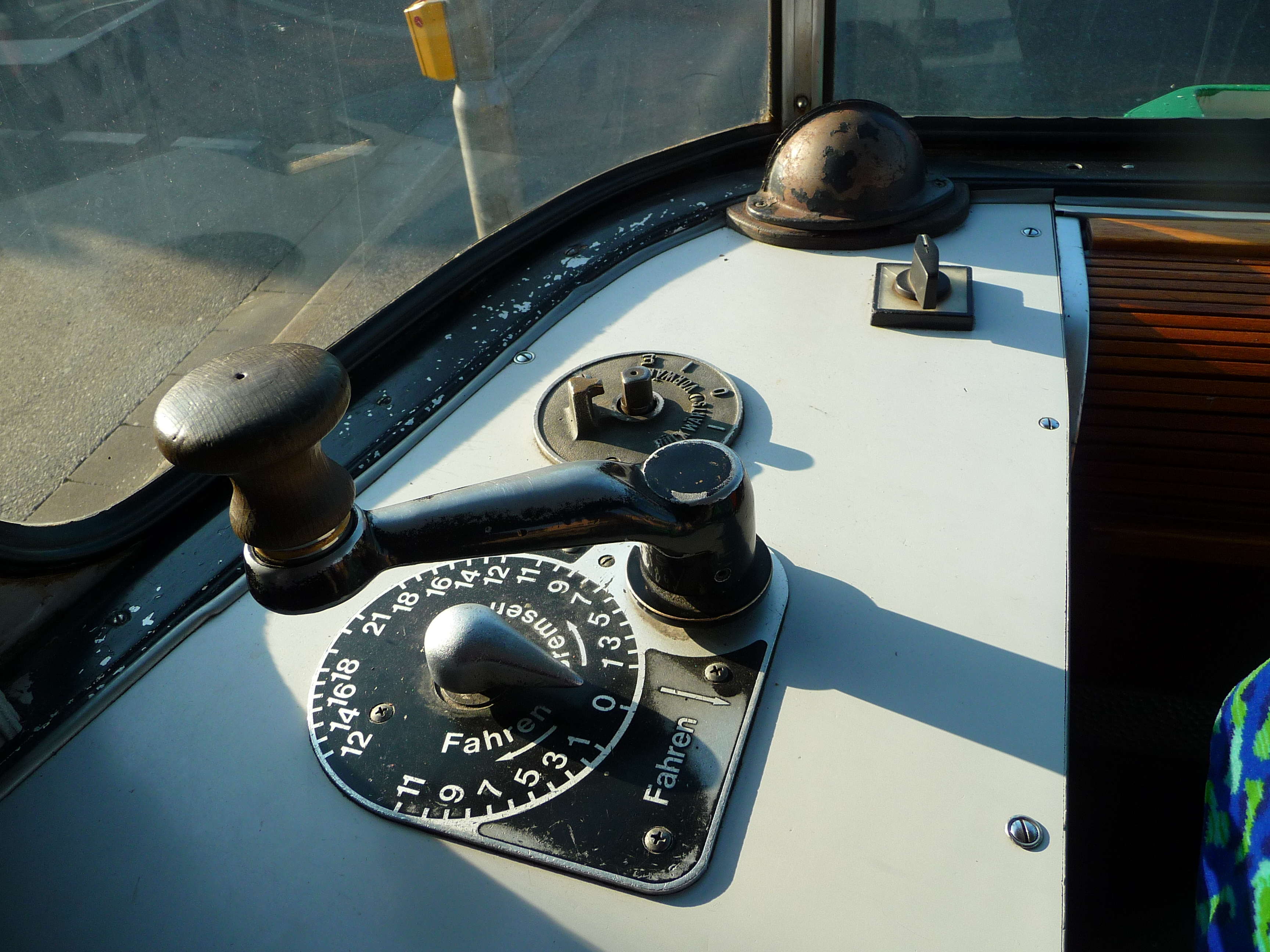 Kurbel im Führerstand eines DUEWAG Gt8 (Straßenbahn), Baujahr 1975